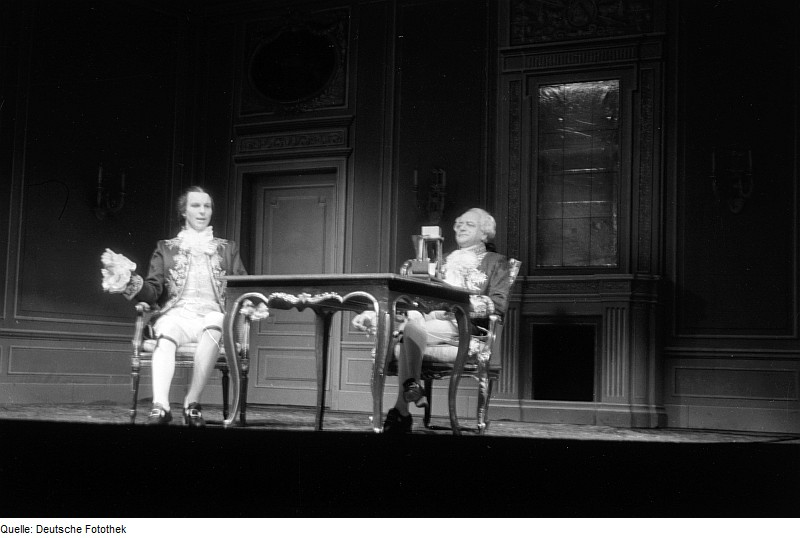 Original image description from the Deutsche FotothekSzenenbilder